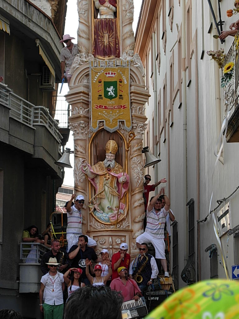 Festa dei Gigli di Nola 2007 Foto personale concessa in PD